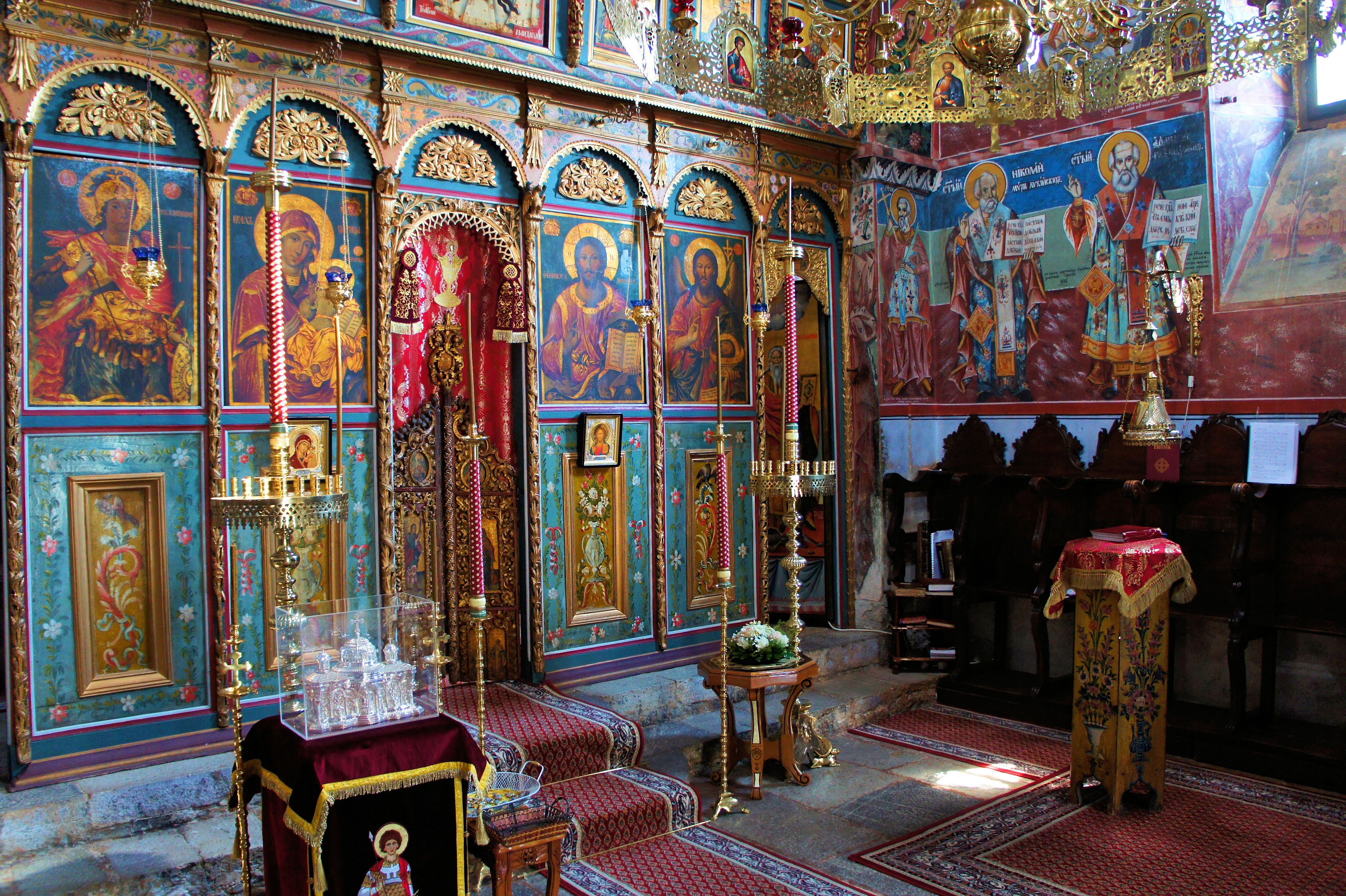 Олтарот на црквата „Св. Ѓорѓи Победоносец“ - Рајчица